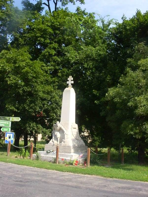 Az I. világháborús hősök emlékműve Egyeden